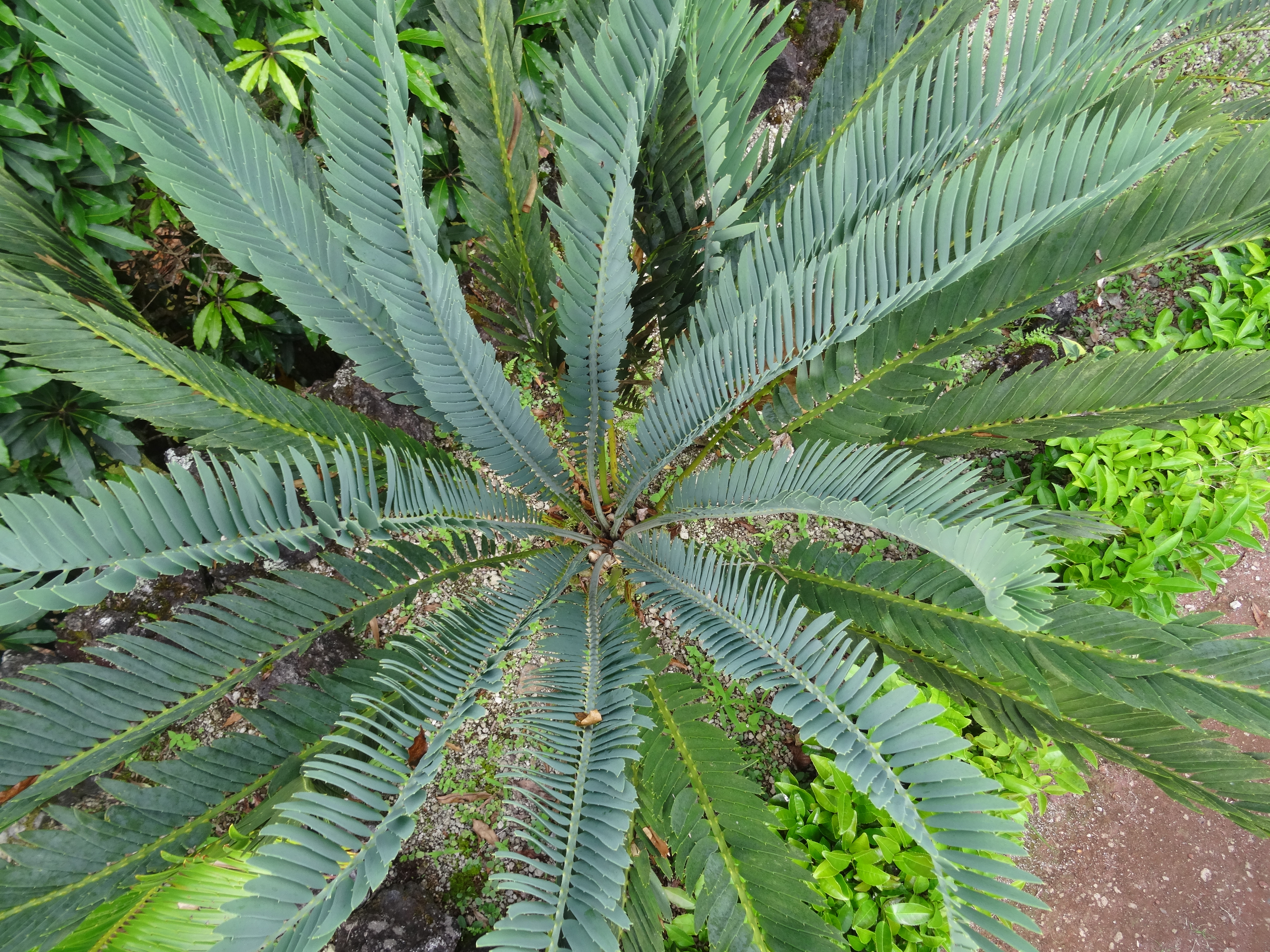 Encephalartos nubimontanus, Parque Terra Nostra, Furnas, Azoren